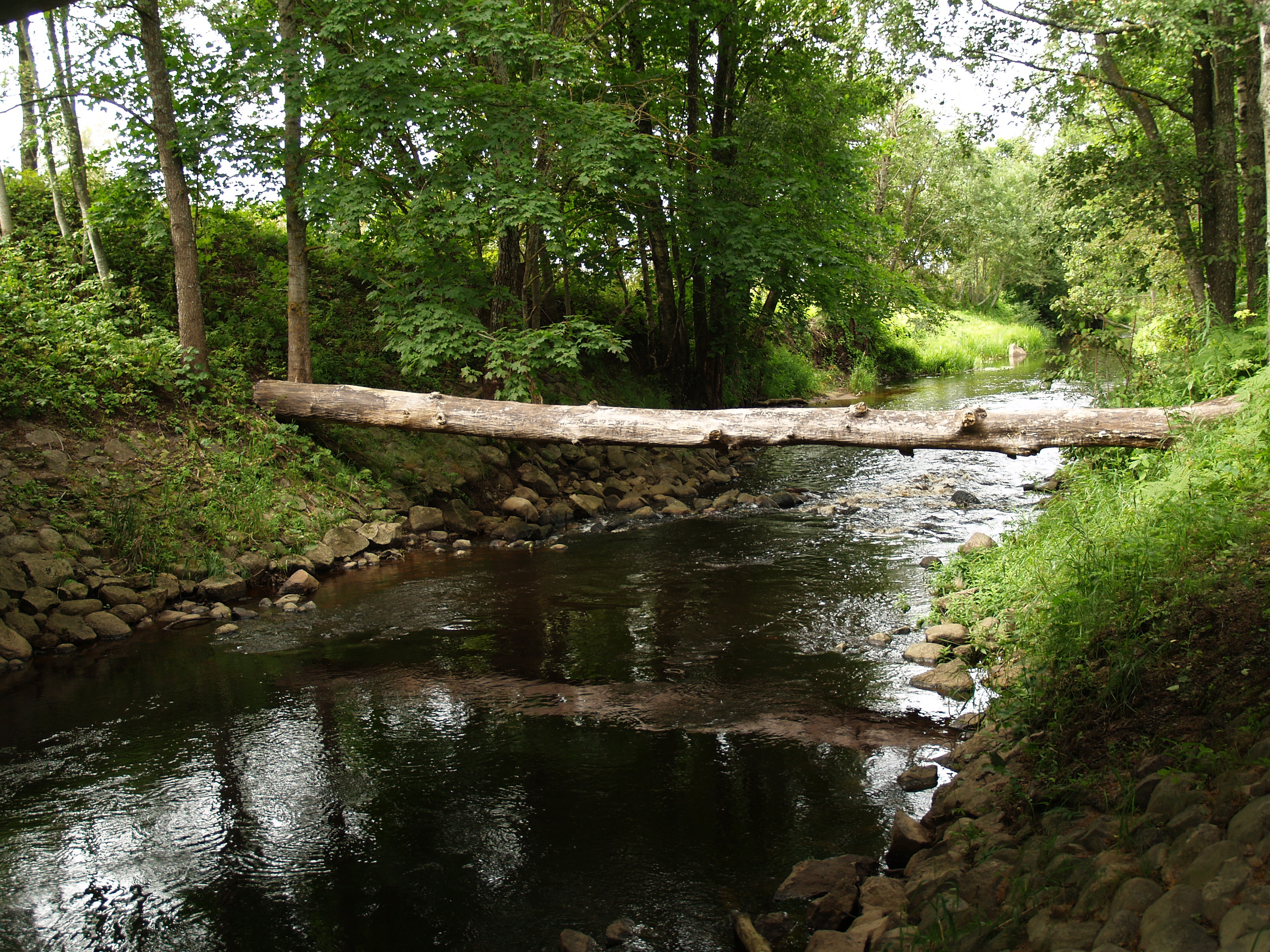 Timmkanal